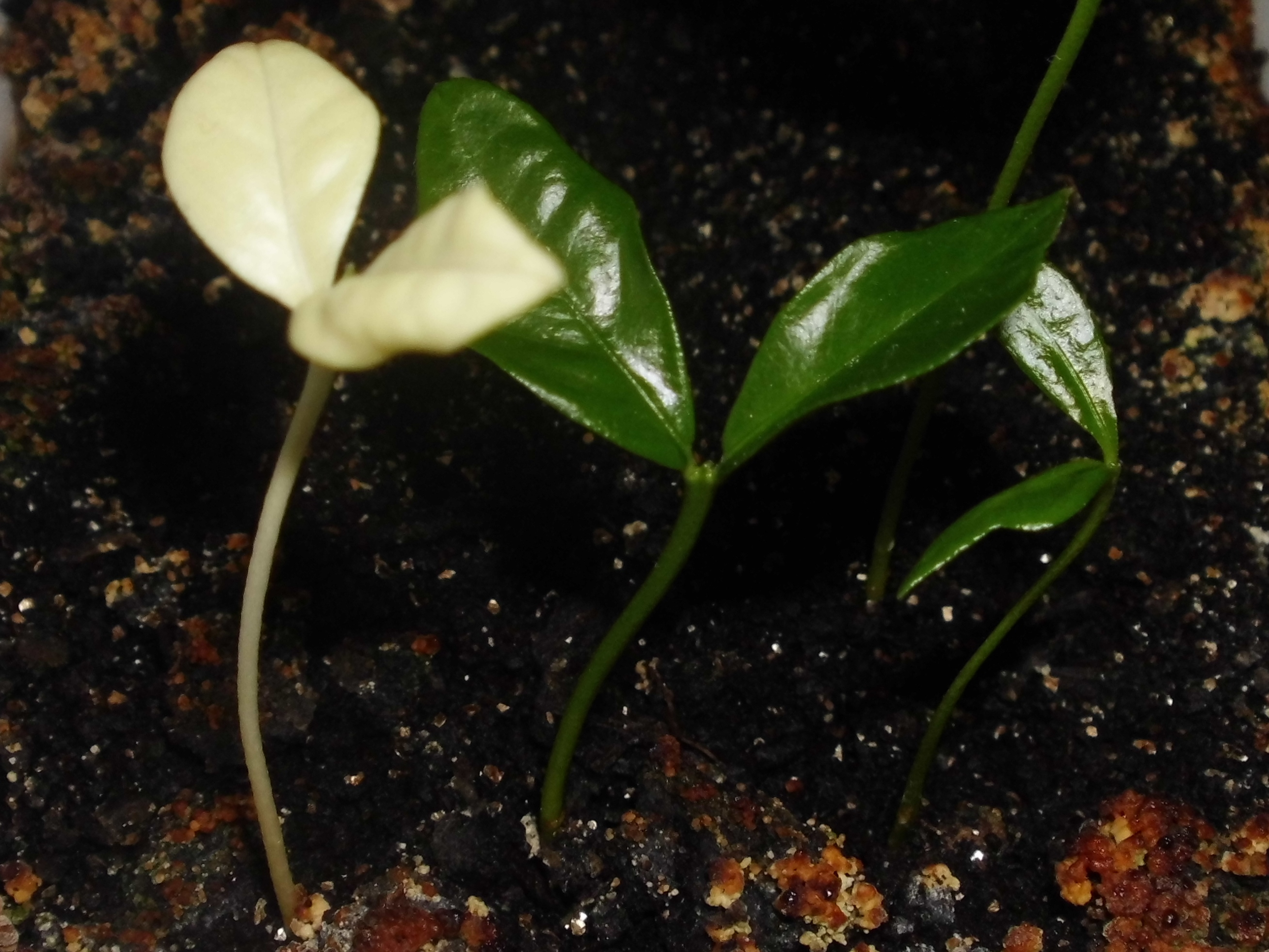 Нагами кумкват (Fortunella margarita). Сеянцы в фазе семядольных листочков. Один из сеянцев - альбинос (хлороз из-за мутации). Погибло в возрасте 1,5 мес. недоразвившийся настоящий лист был светло-бело зелёного цвета.